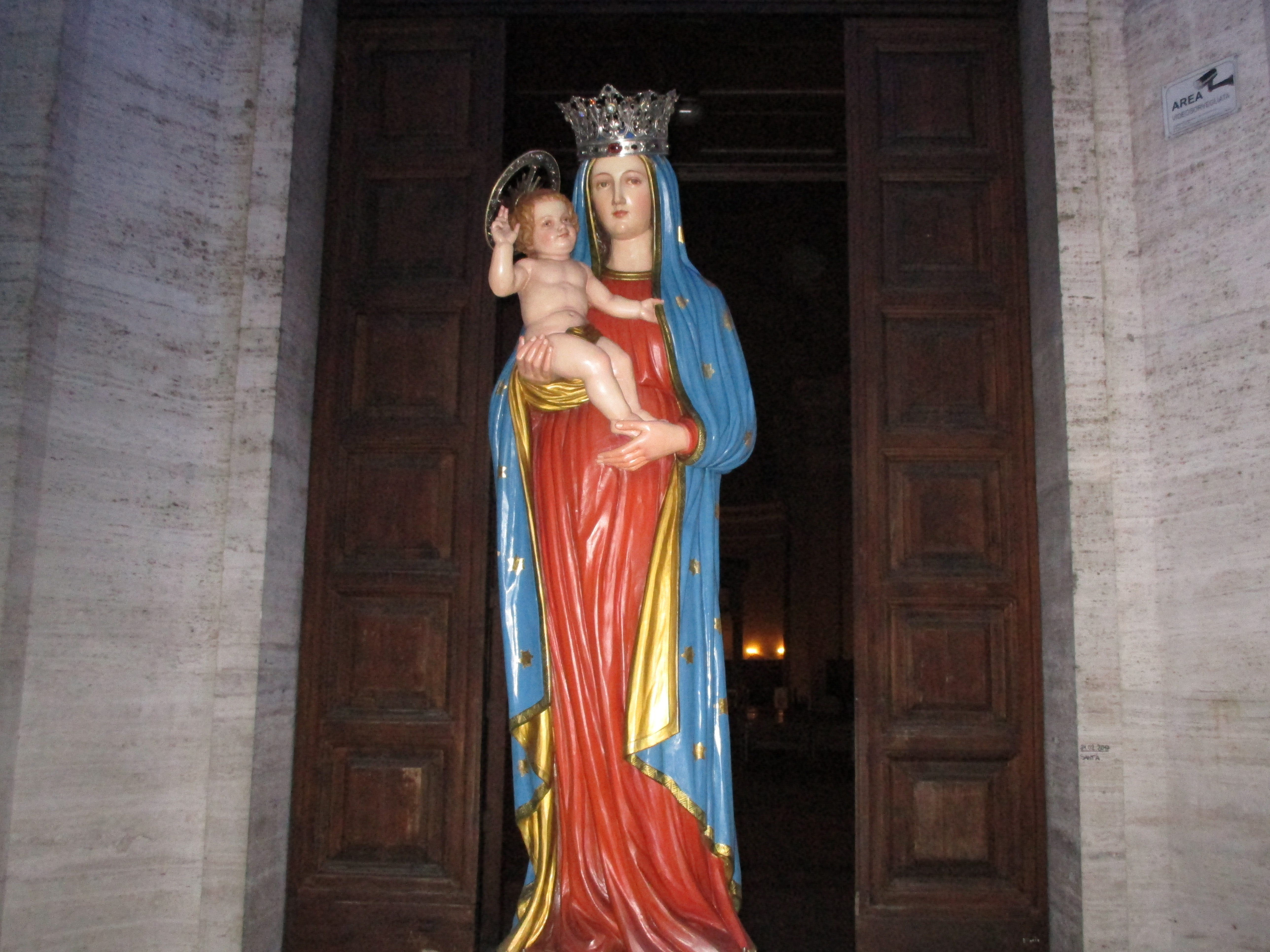 Statua della Madonna di Pietraquaria